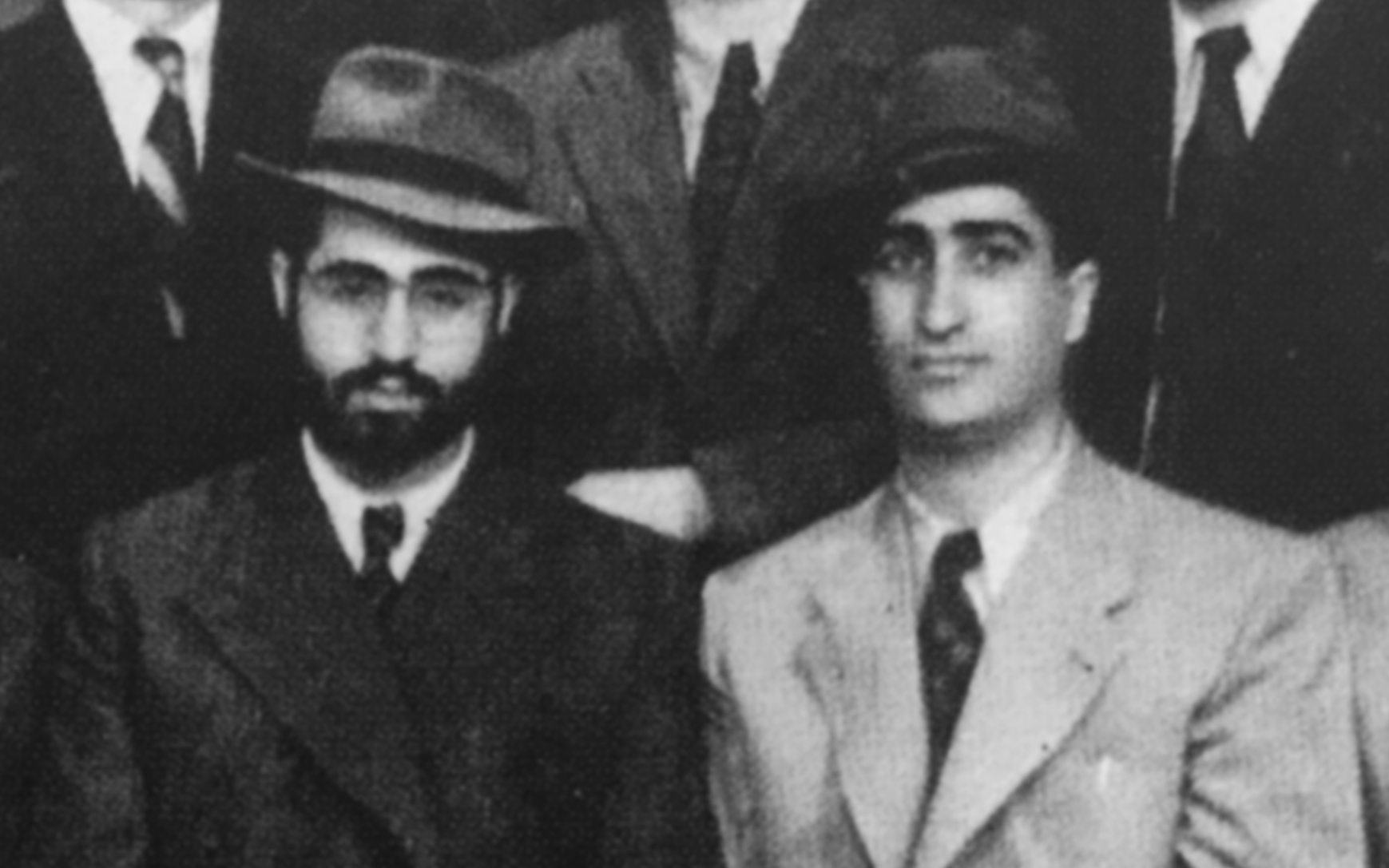 מסיבת פרידה לרב עובדיה יוסף, לפני צאתו למצרים, ישיבת פורת יוסף, ט"ז אב תש"ז. מימין יושב הרב ברוך בן חיים, חברו לספסל הלימודים.